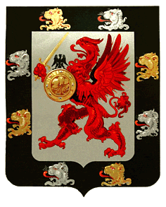 A Romanov ház címere